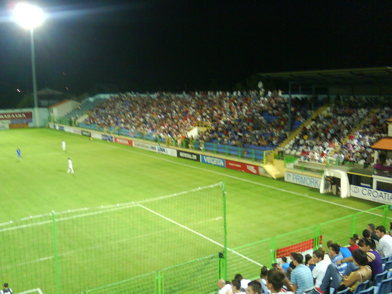 Pecara-utakmica Široki Brijeg-Banants